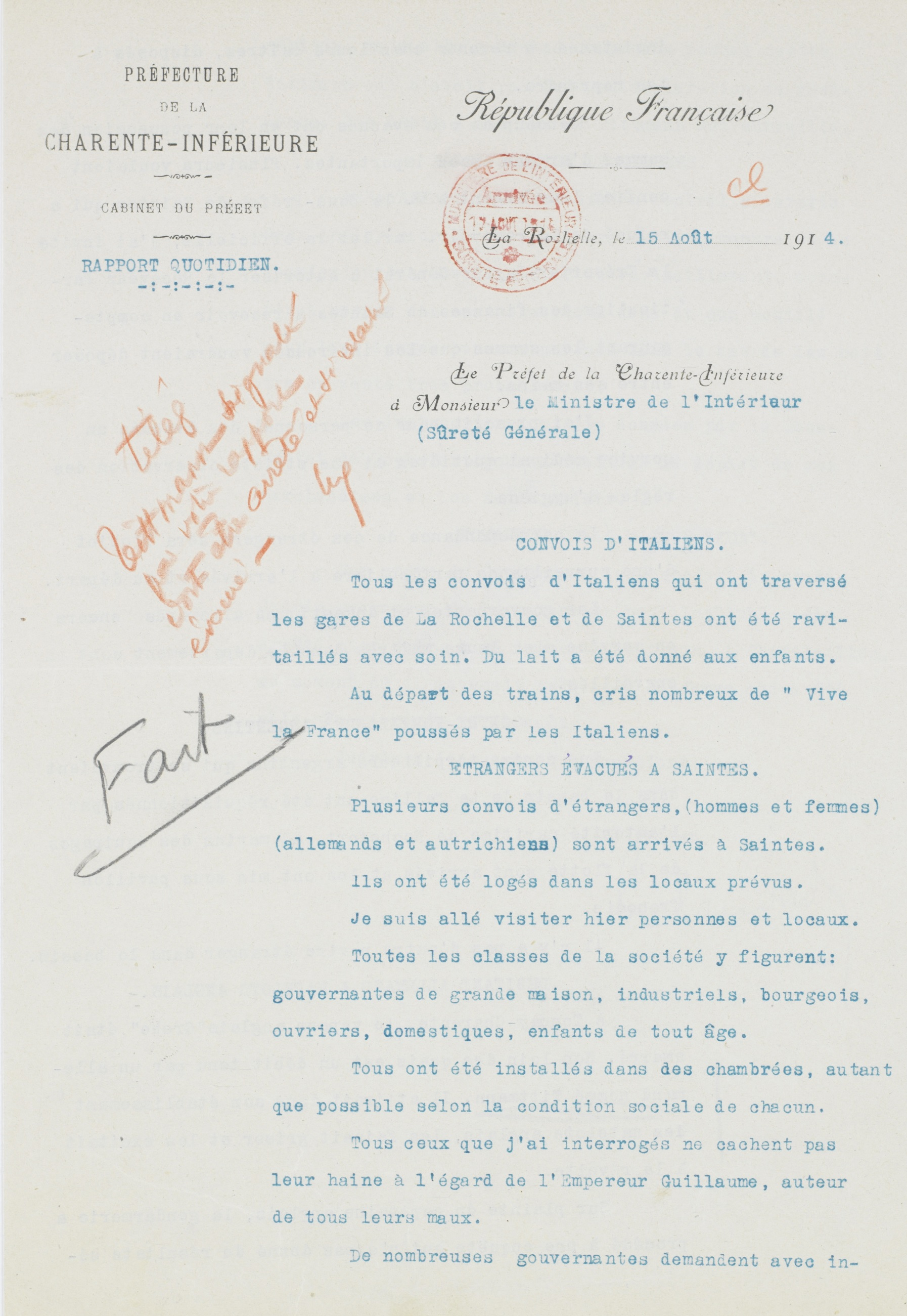 Rapport de Pierre Landrodié, préfet de Charente-inférieure (1909-1918) à Louis Malvy, ministre de l’Intérieur (1914-1917) sur l'évacuation de ressortissants étrangers, 15 août 1914